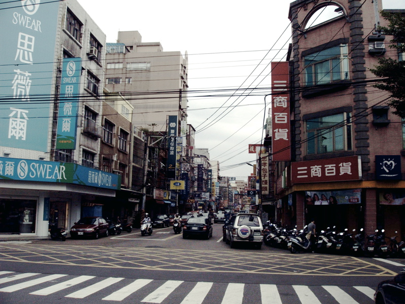 桃園縣中壢市內壢忠孝路。